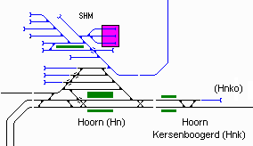 Sporenplan station Hoorn (Noord-Holland) en directe omgeving. Bron: met explicite toestemming per email. Bewerkt. Te gebruiken met bronvermelding: "S. Zeegers - Sporenplan.nl". E-mail met permissie te vinden in Wikipedia:De kluis. Auteur: S. Zeegers - Sporenplan.nl